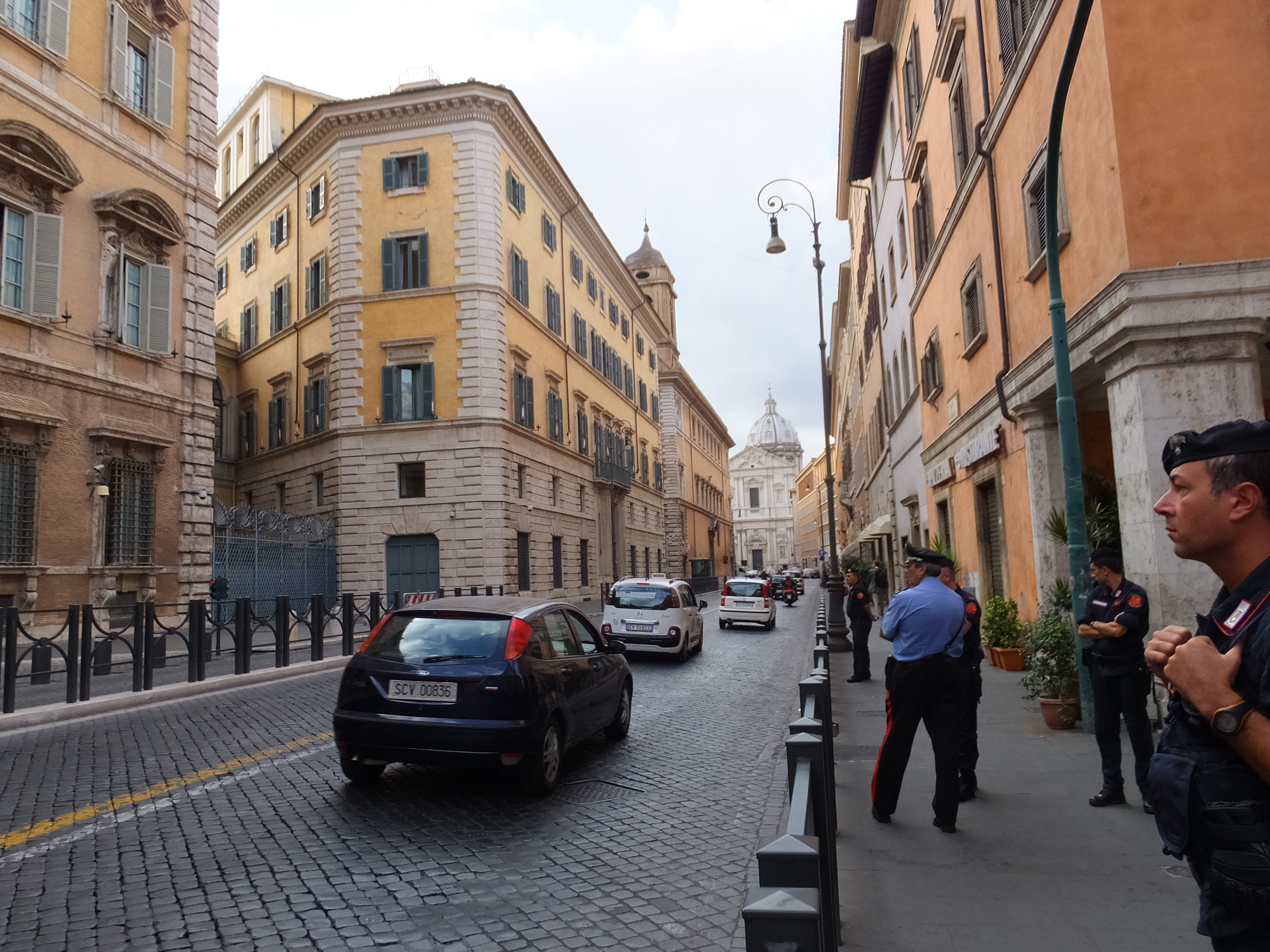 Piazza Madama 夫人廣場